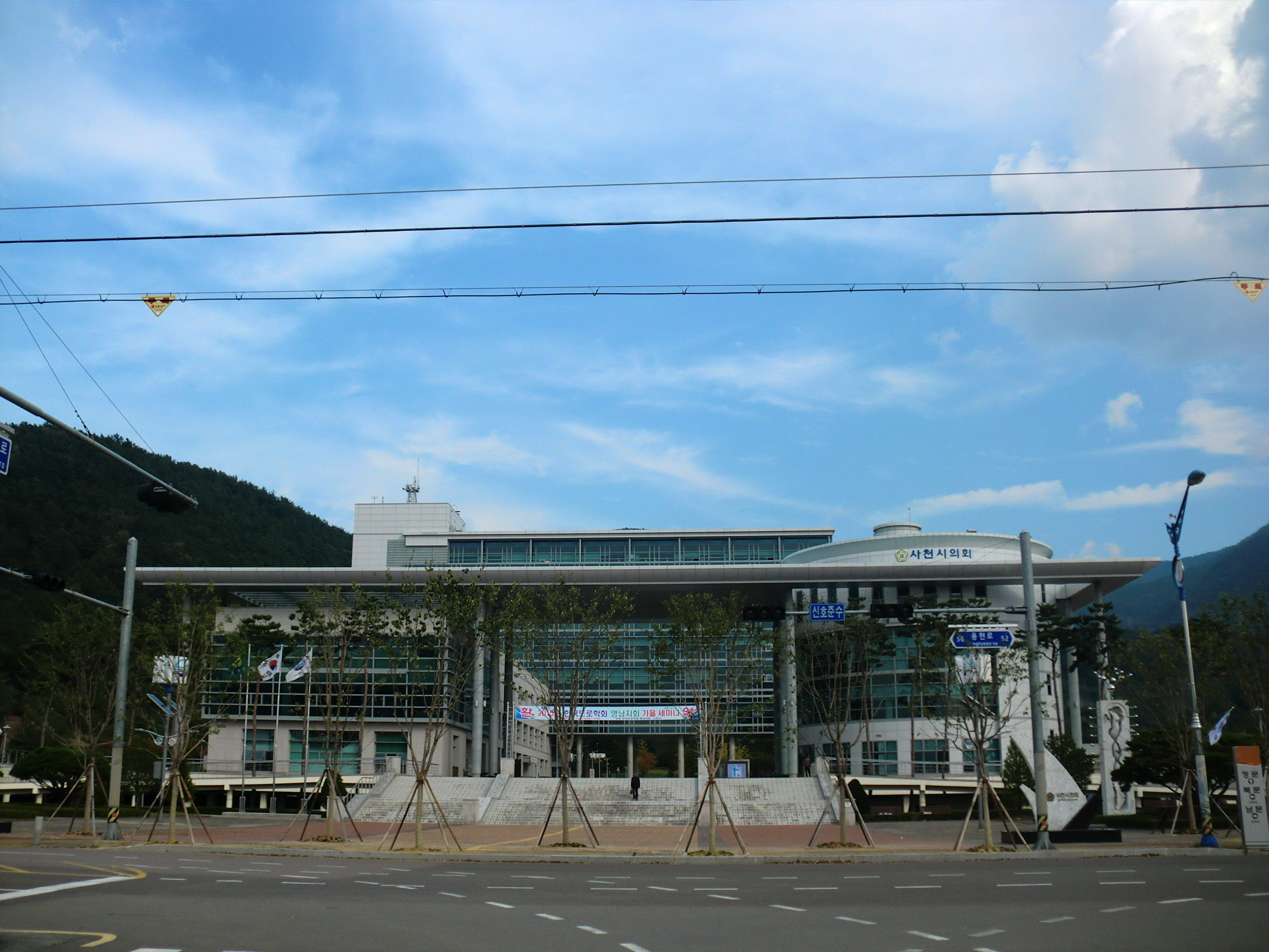 경상남도 사천시에 있는 사천시청